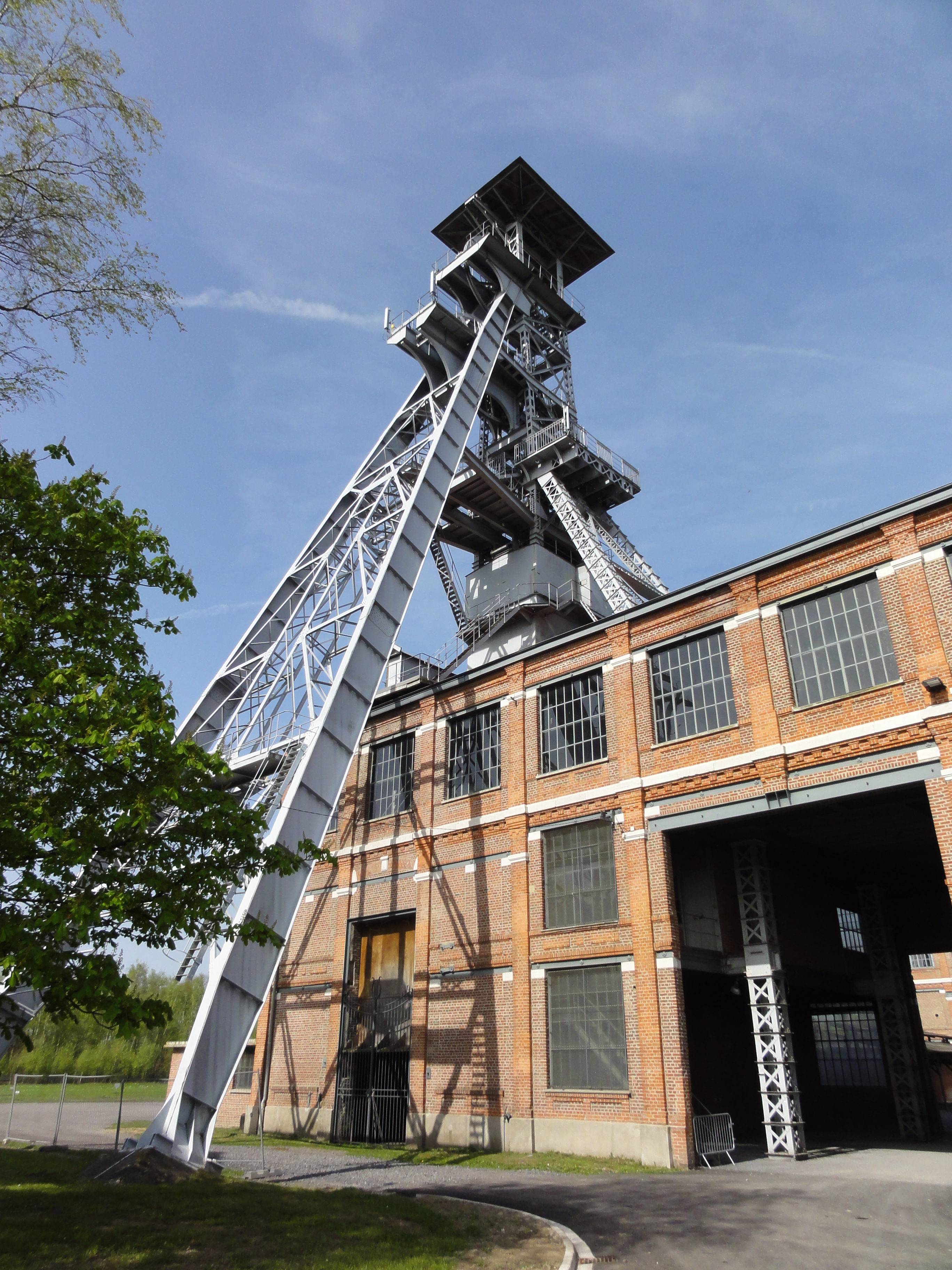 Ce document a été réalisé avec l’aimable autorisation de la Communauté d'agglomération de la Porte du Hainaut. Français | +/−